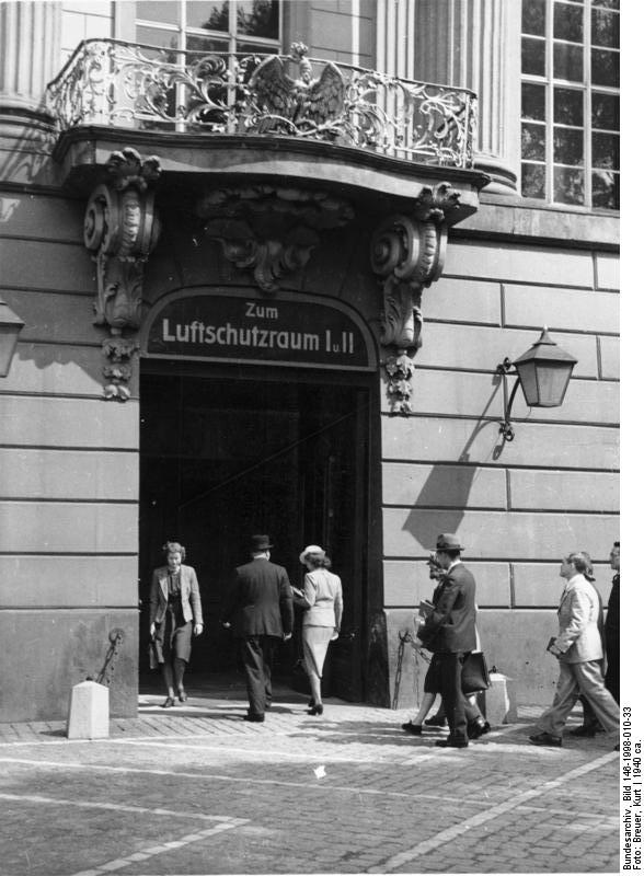 Reichshauptstadt Berlin. Universität (Hauptportal) Beschreibung: Über dem Hauptportal ist der Schriftzug "Zum Luftschutzraum I und II" angebracht. vor 1941